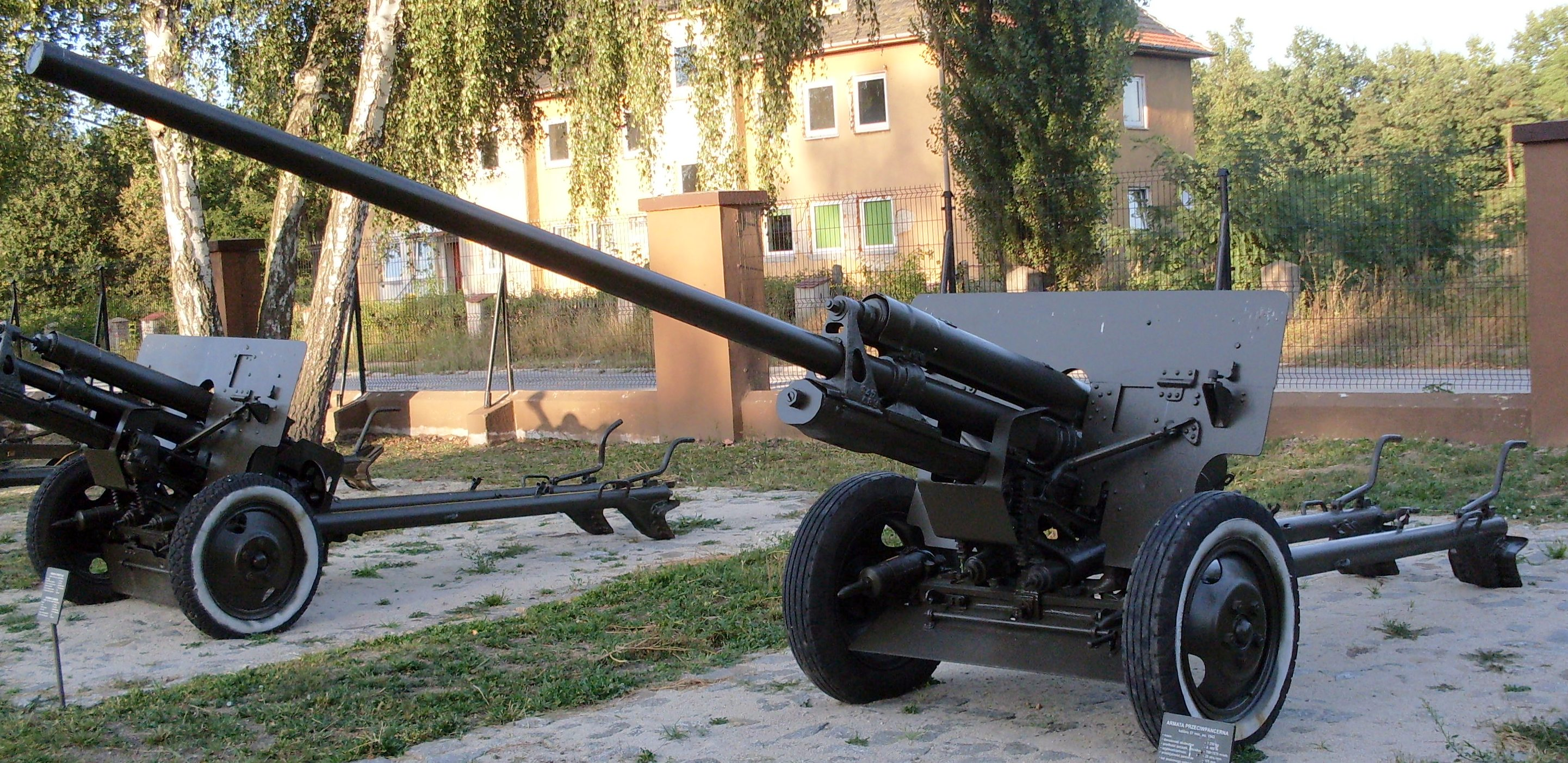 57_mm_armata_ppanc_wz_1943